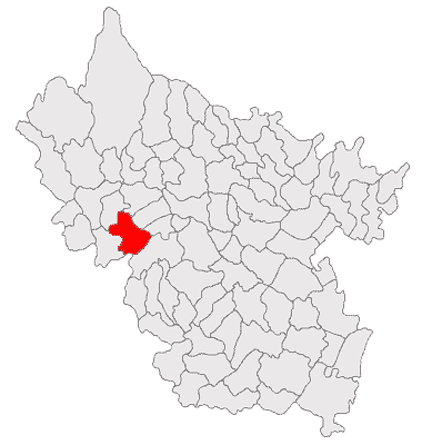 Categorie:Hărţi ale judeţului Buzău